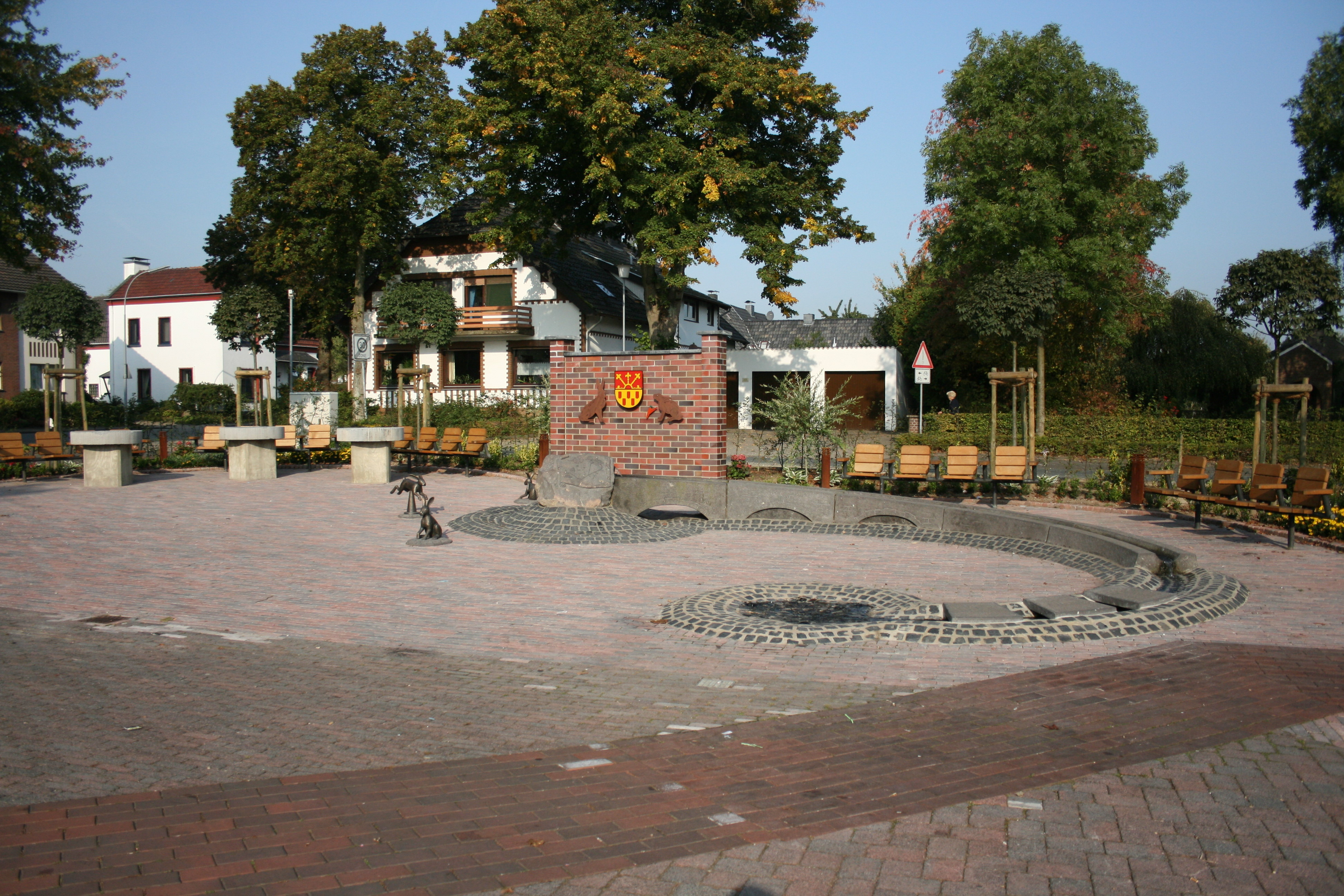 Hasenbrunnen in Sonsbeck-Labbeck